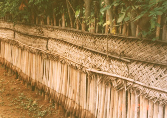 Shot by the user who uploaded it.